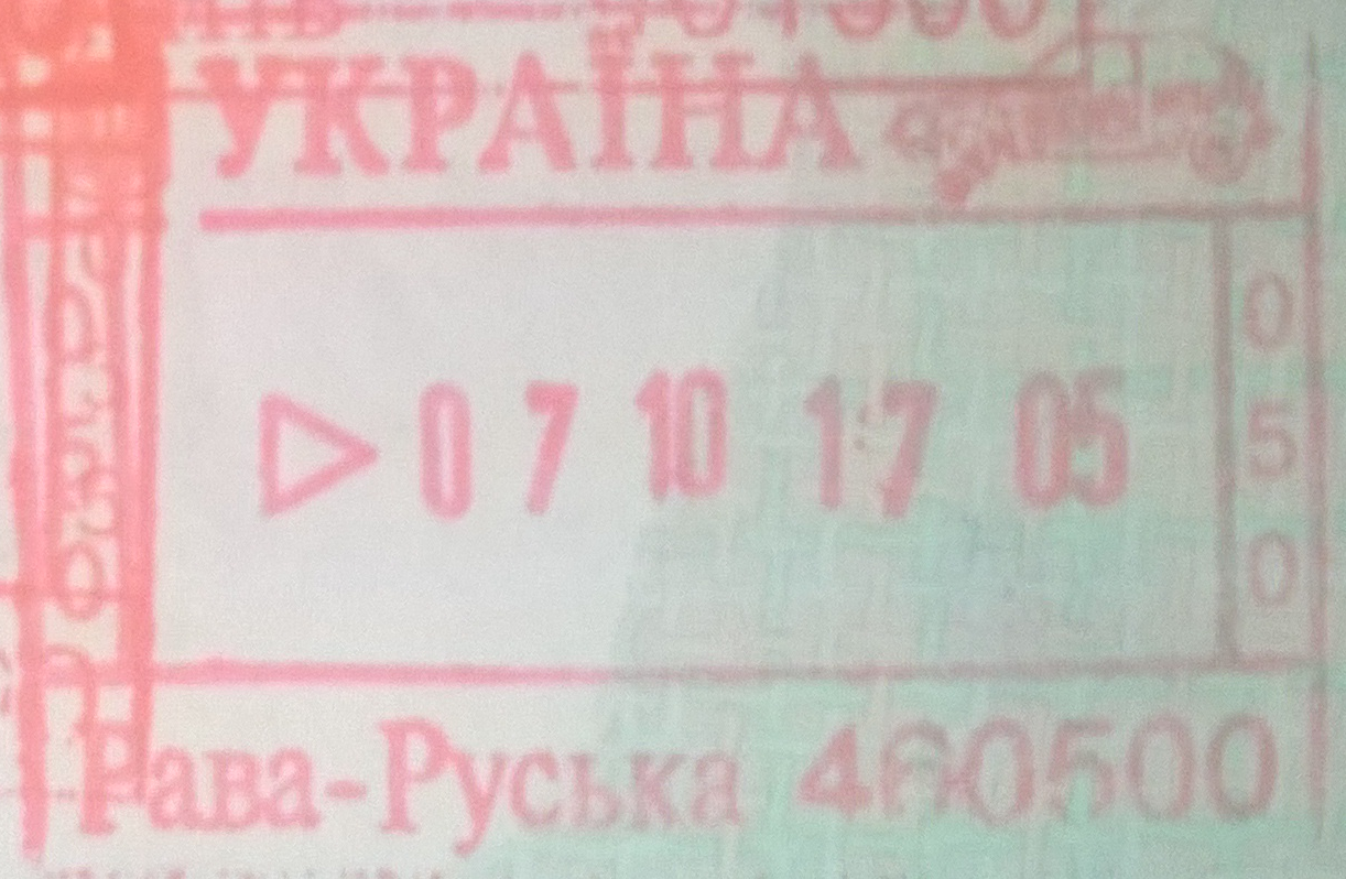 Stempel paszportowy wjazdowy Hrebenne/Rawa Ruska